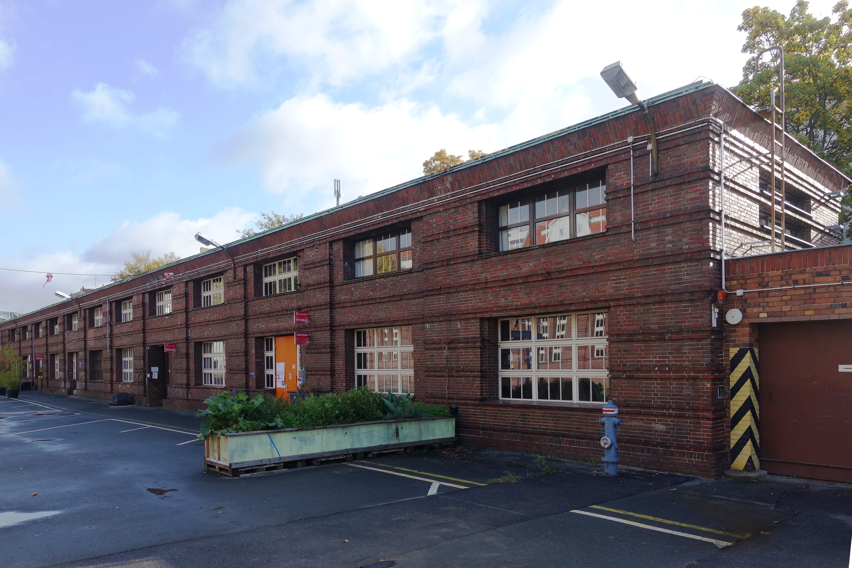 Lager- und Personalgebäude an der Panke, Straßenbahnbetriebshof Gesundbrunnen